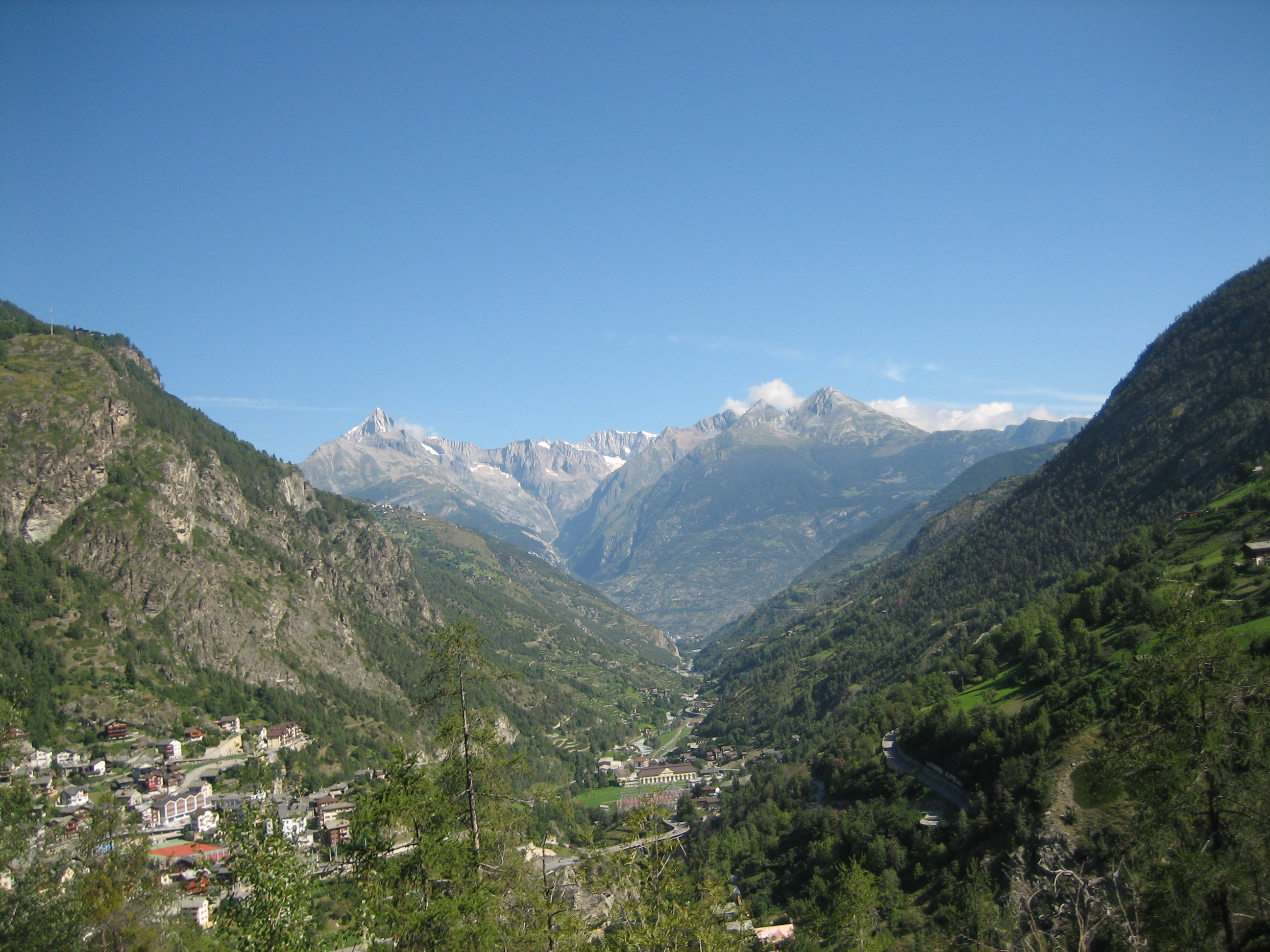 Vispertal von Stalden talauswärts gegen die Berner Alpen mit dem Bietschhorn (links).